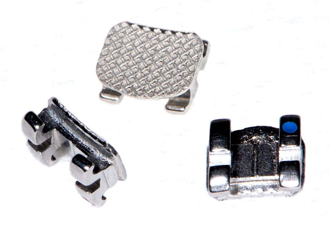 MBT Metall Brackets